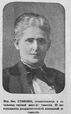 Мария Николаевна Стоюнина, основательница и начальница частной женской гимназии в Санкт-Петербурге, Российская Империя.